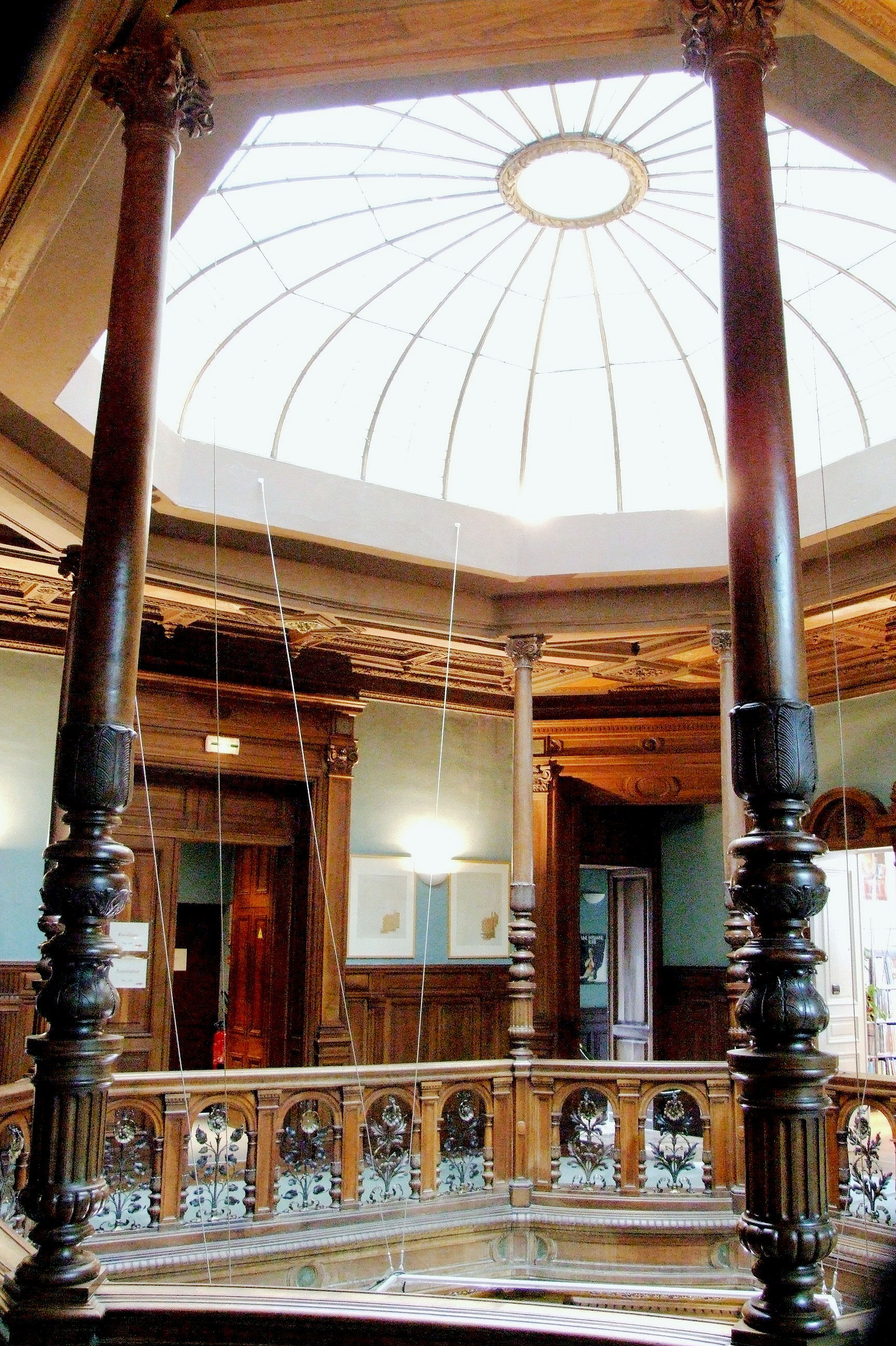 Bar-le-Duc - Château de Marbeaumont - Hall